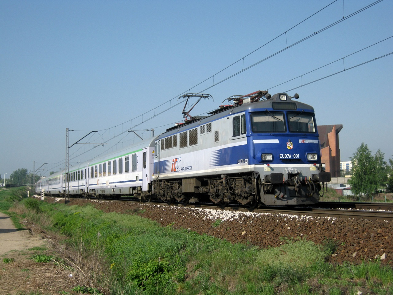 EU07A-001 PKP IC z pociągiem EIC Fredro relacji Wrocław Główny- Warszawa Wschodnia